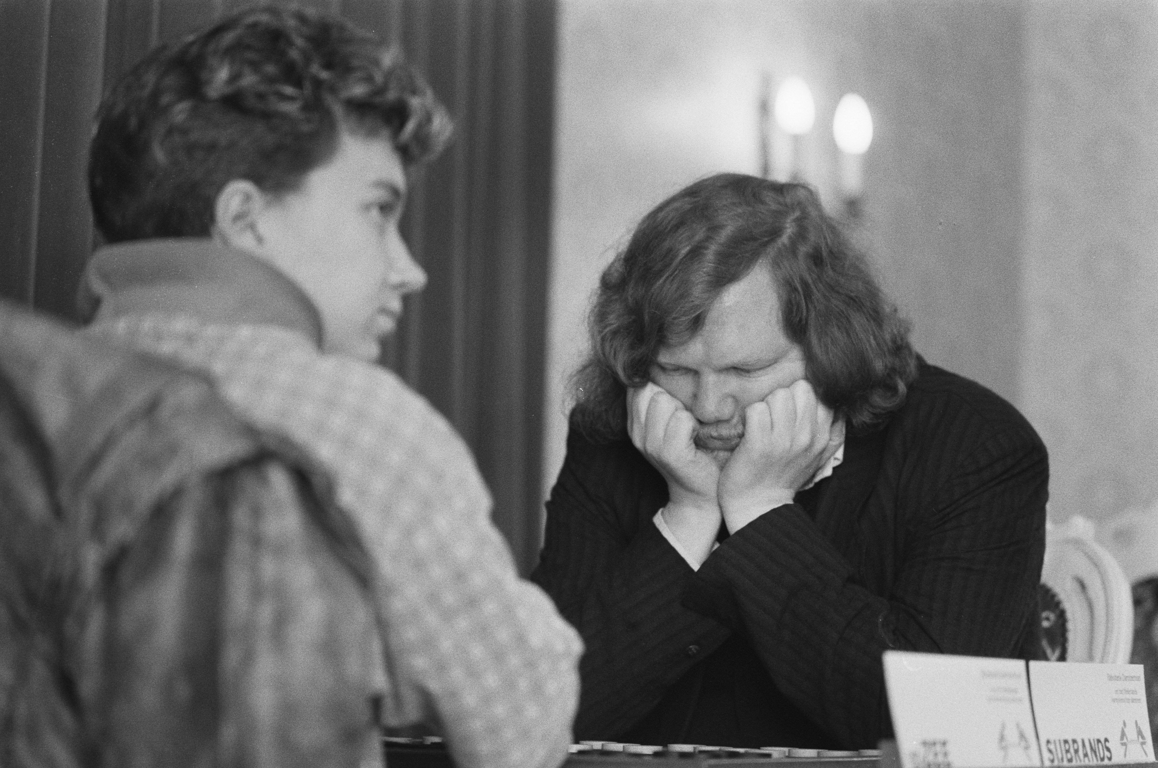 NK dammen in Putten; Sijbrands